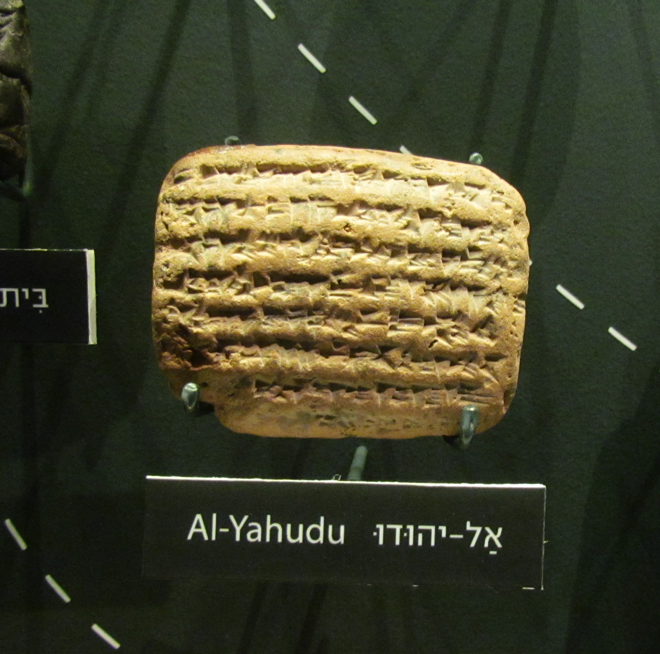 מתעודות אל יהודו: לוחות טין מוטבעים בכתב יתדות. מוזיאון ארצות המקרא, ירושלים. תעודה זו מכילה את הטקסט "אל-יהודו"